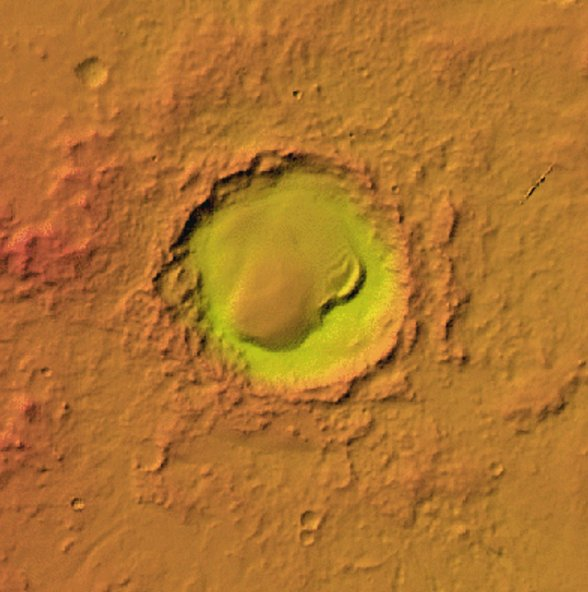 Cráter marciano South. (Imagen IAU/USGS/Goddard/A SU/USGS)